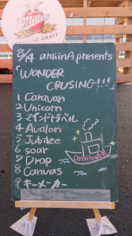 amiinAセトリボード(20180814(1))